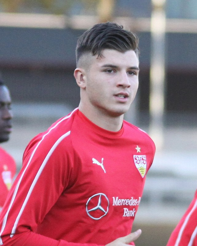 Antonis Aidonis am 05.11.2018 im Training der VfB-Profis